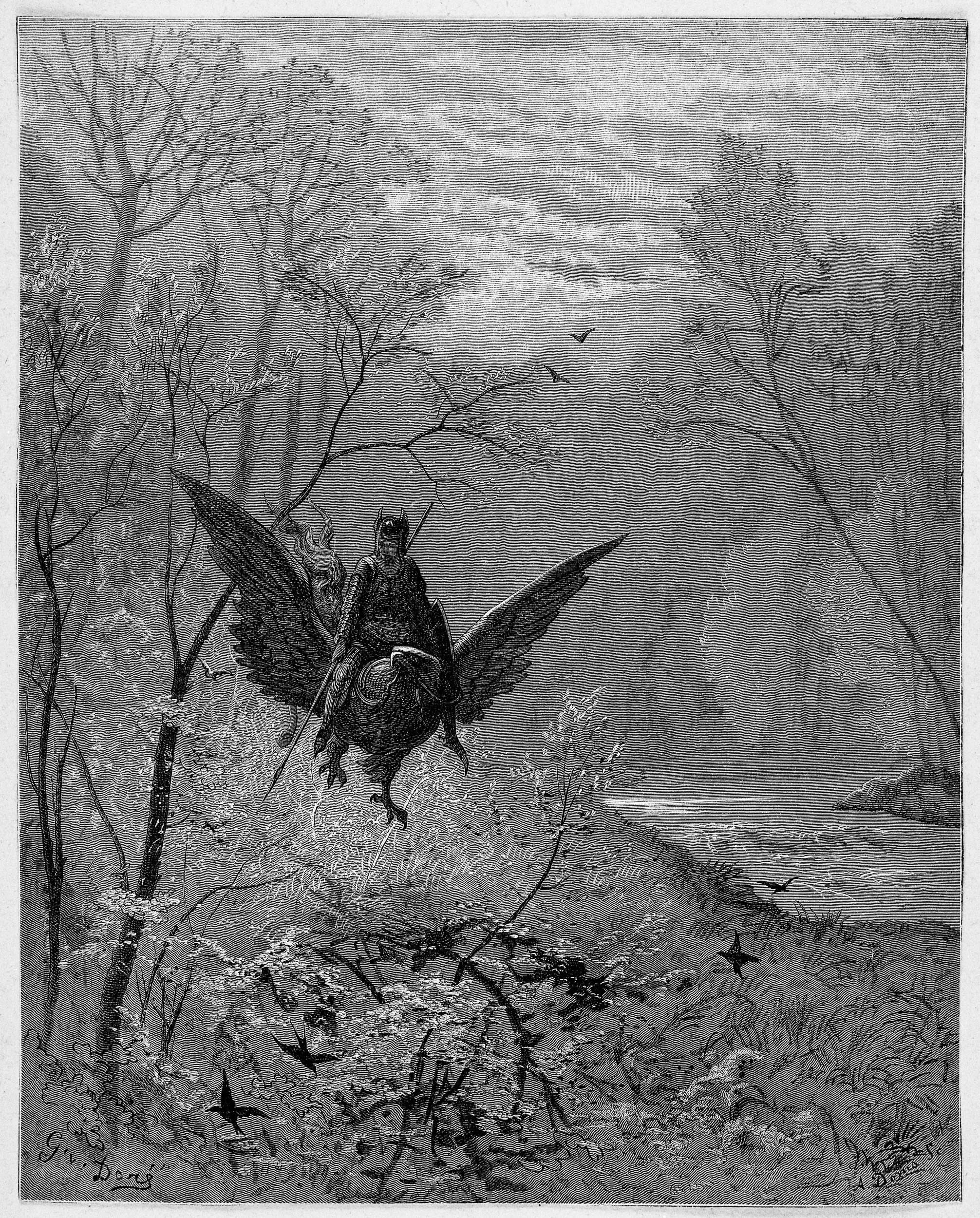 illustration of Ludovico Ariosto’s “Orlando Furioso”.